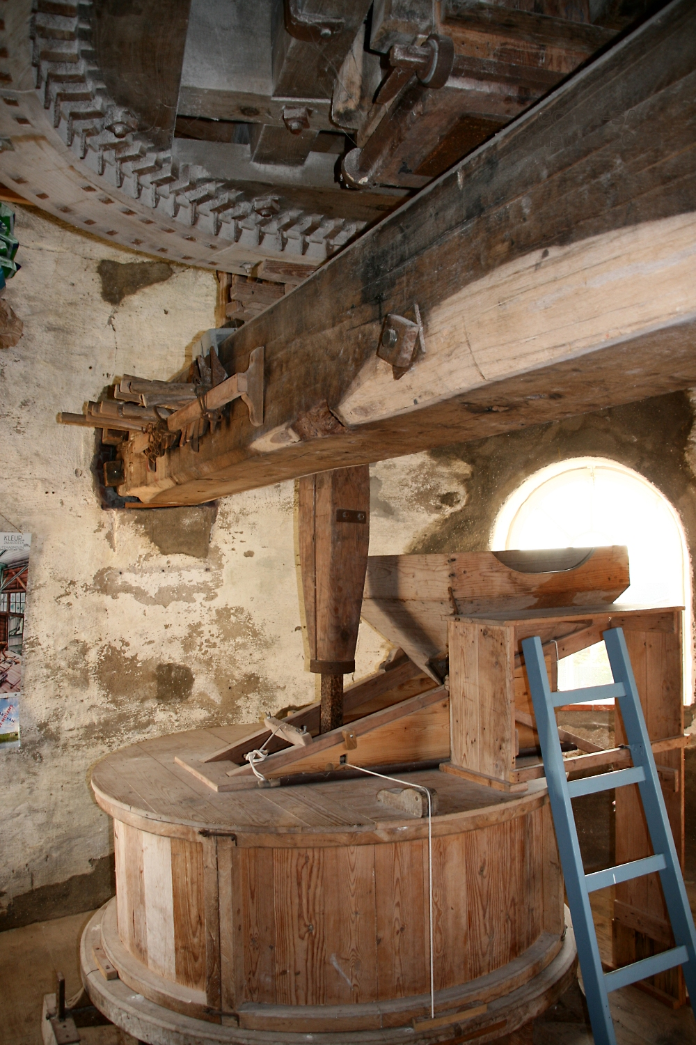 Cadzand: molen Nooit Gedacht, maalkuip